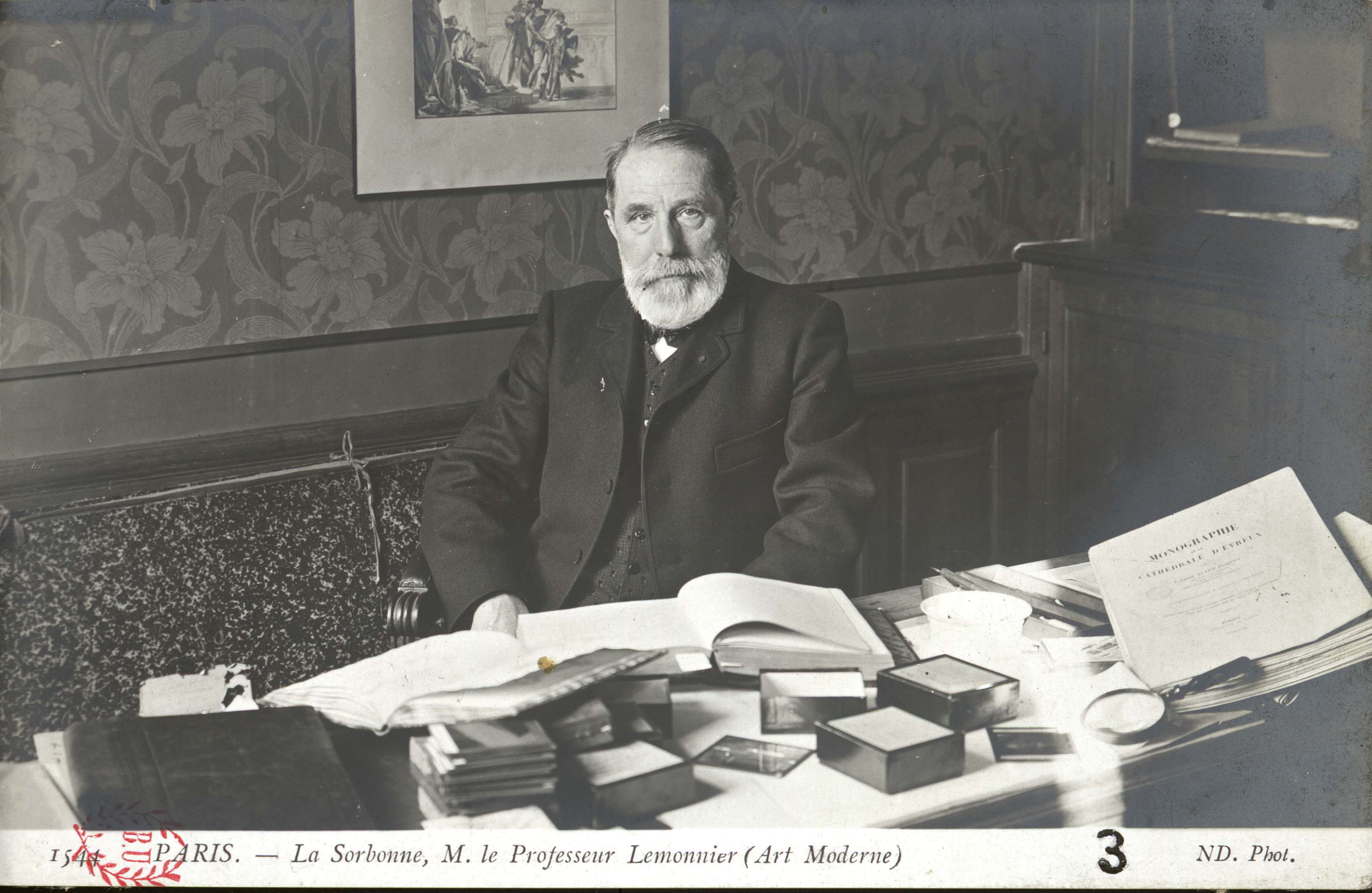 Carte postale photographique